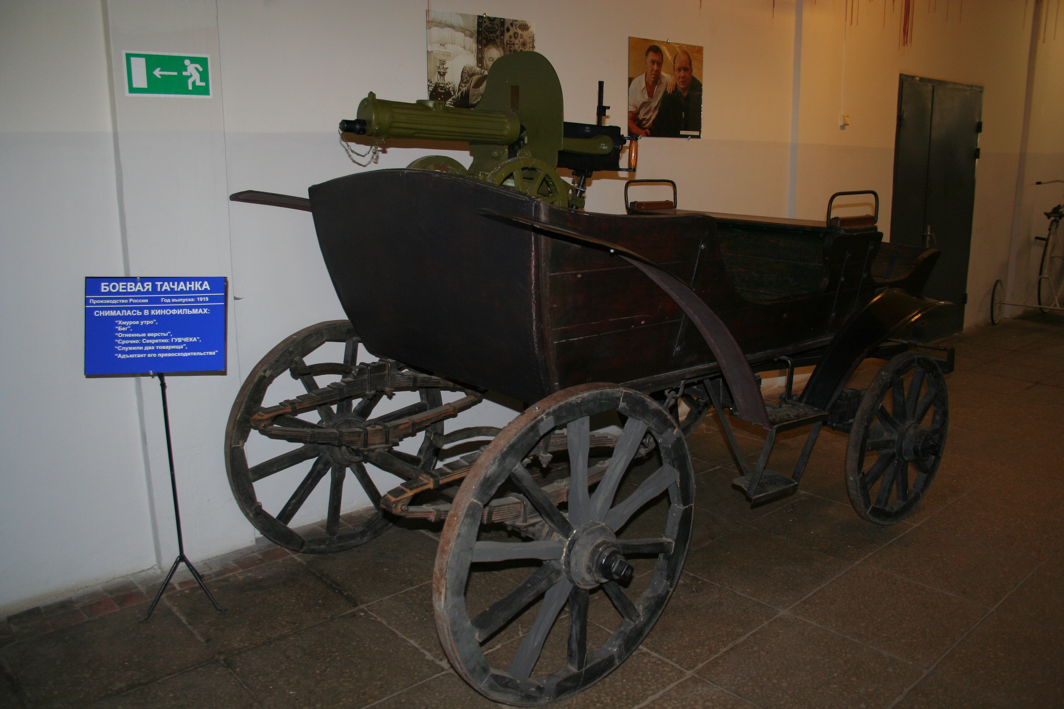 Museum auf dem Gelände des Filmstudios Mosfilm in Moskau. Die Exposition. Eine russische Tatschanka (Kampfwagen), Baujahr 1919.